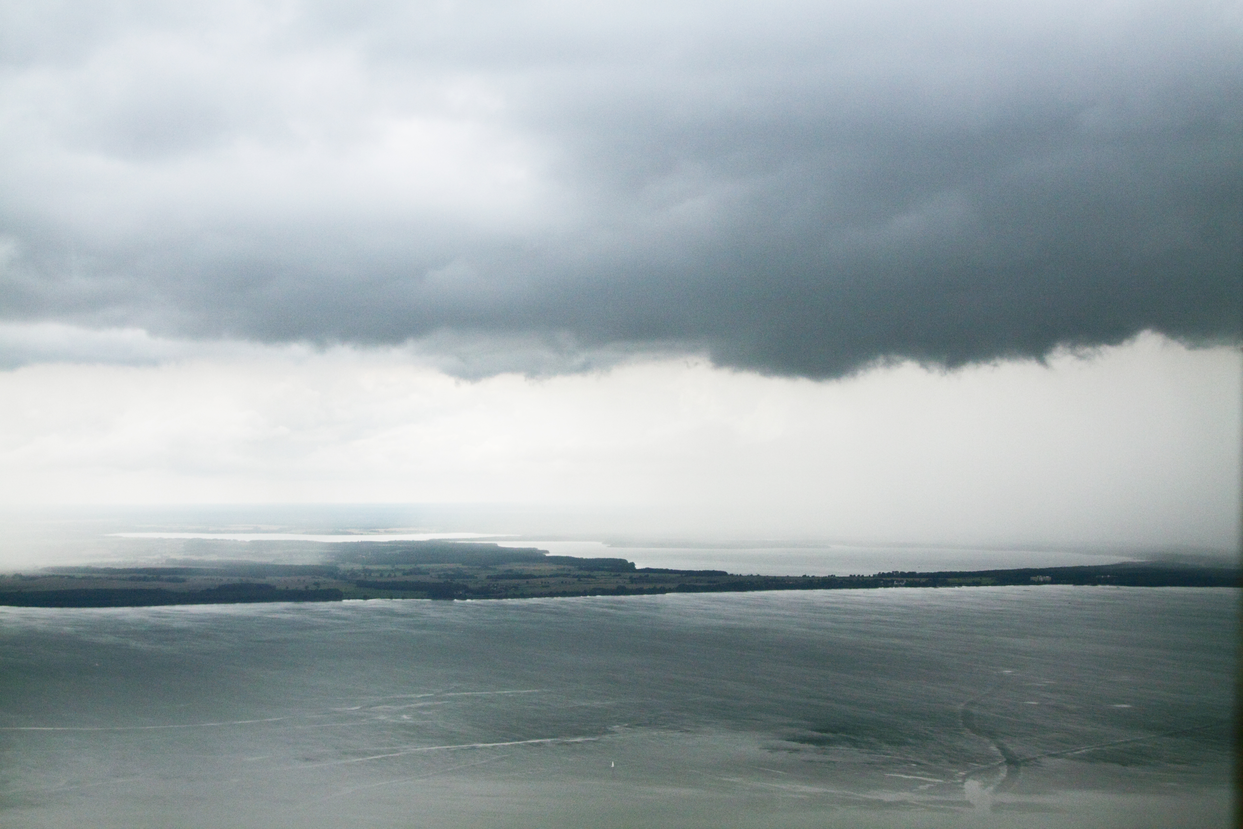 Fotoflug Waren-Müritz und Umgebung: Müritz, Kölpinsee und Fleesensee